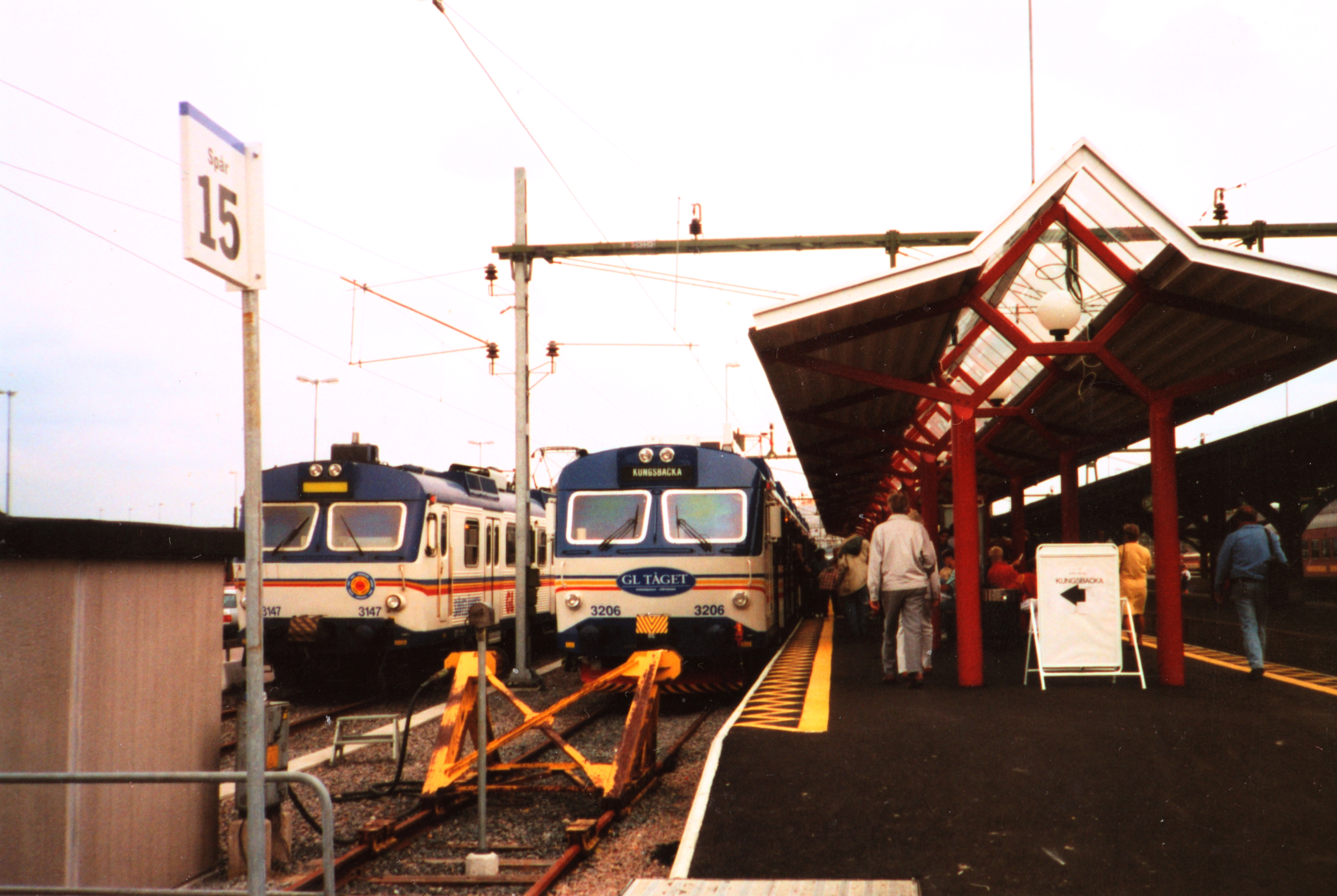 Göteborgs station, pendeltåg (ca 2001)